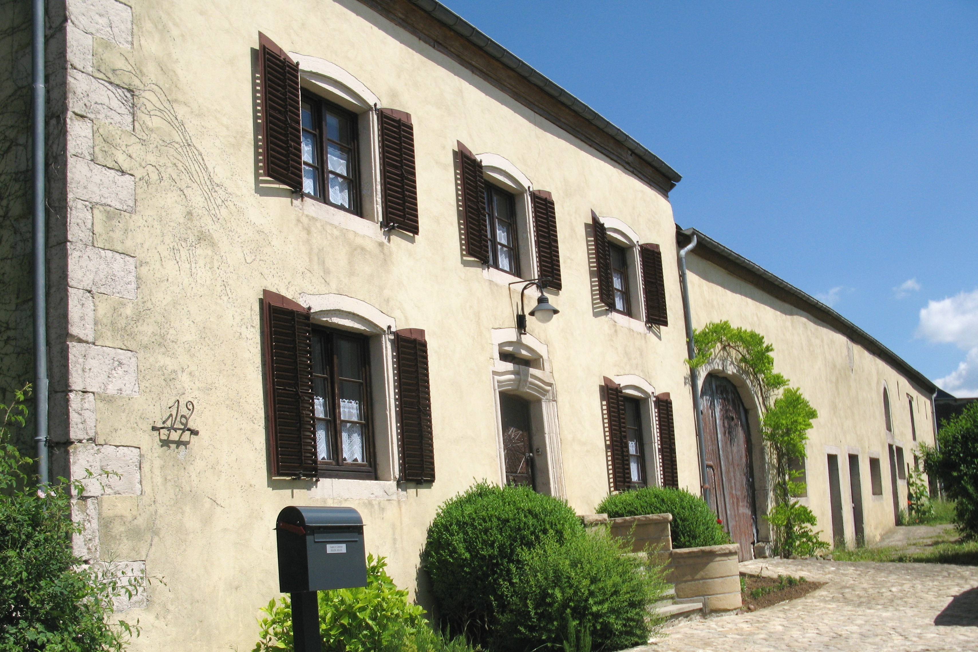 De Maria-Theresienhaff a Gräins zu Uwerpallen.